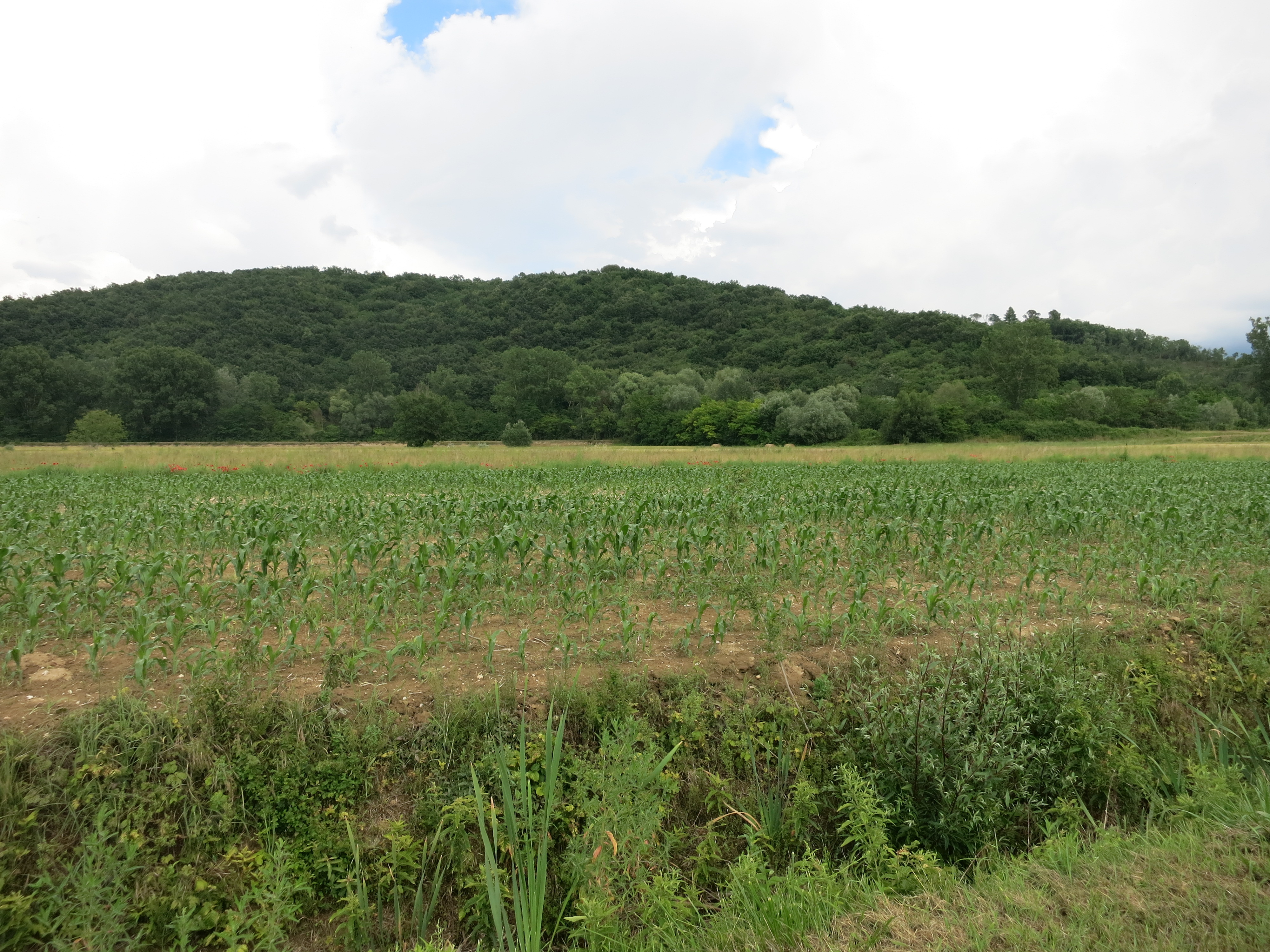 Il colle di Montecchio o Monticchio, nella Piana Reatina tra Rieti e Contigliano (Italy), fotografato dalla Ciclovia della Conca Reatina.